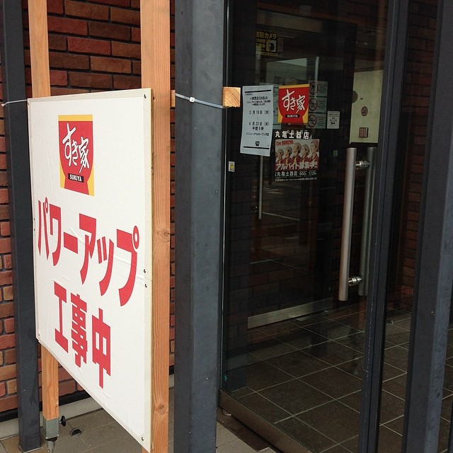 丸亀土器店